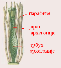 Description: Схема перихецијума Source: self-made